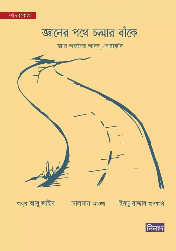 একটি বই যা ইন্ট্রা-মুসলিম সমাধানের জন্য লেখা